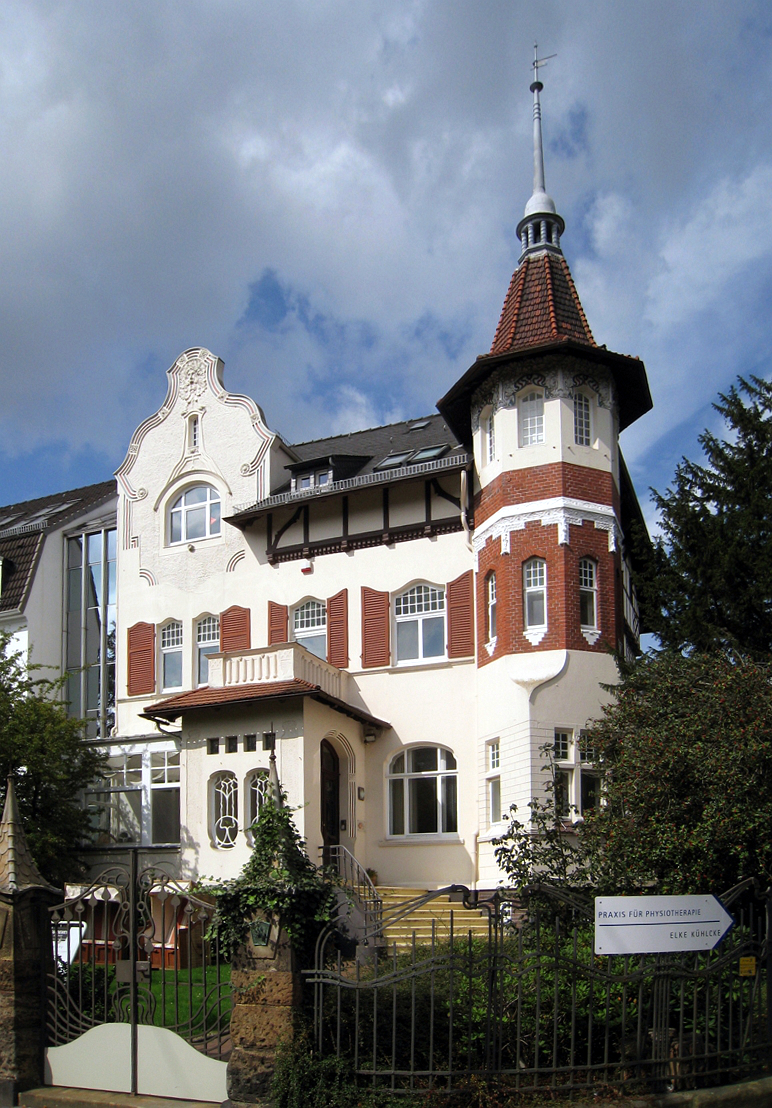 Villa Vollmer in Bremen, Schwachhauser Heerstraße 90.Das abgebildete Objekt ist ein geschütztes Kulturdenkmal in der Freien Hansestadt Bremen, mit der Nr. 1123 beim Landesamt für Denkmalpflege registriert.